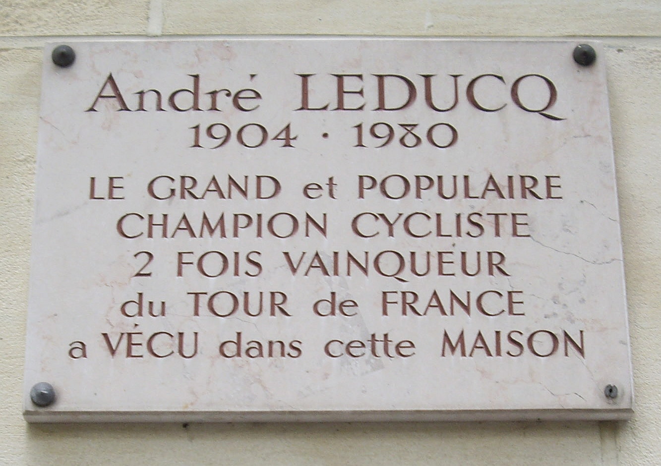 Plaque apposée au n° 19 de la rue Michel-Ange, Paris 16e. « André Leducq, 1904-1980, le grand et populaire champion cycliste, 2 fois vainqueur du Tour de France, a vécu dans cette maison. »